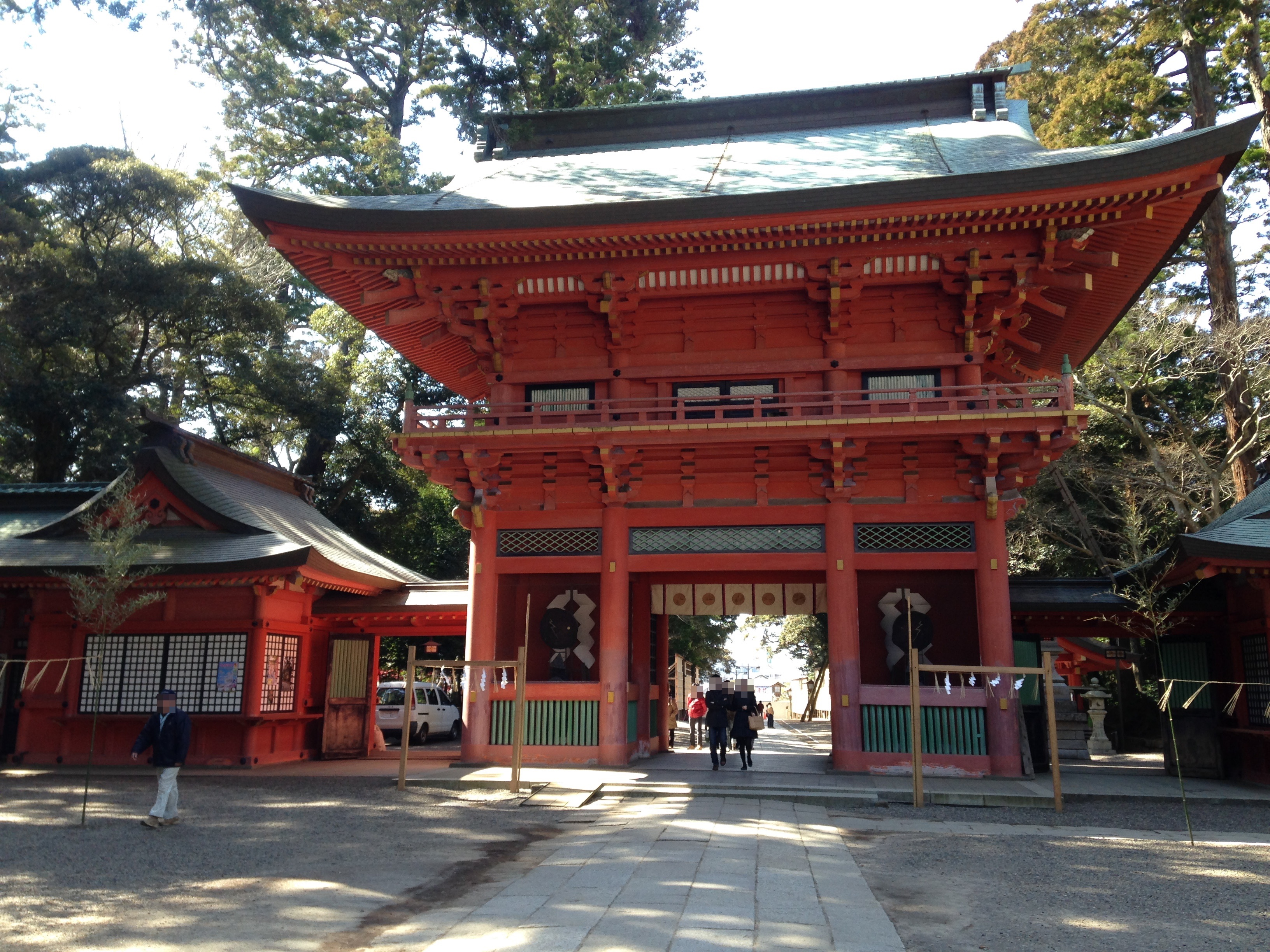 鹿島神宮・境内側より望む楼門